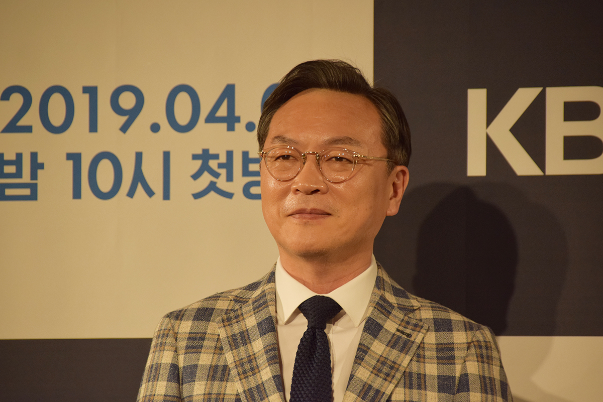 김의성 KBS 2TV 월화드라마 '국민여러분!' 제작발표회 (2019.4.1)